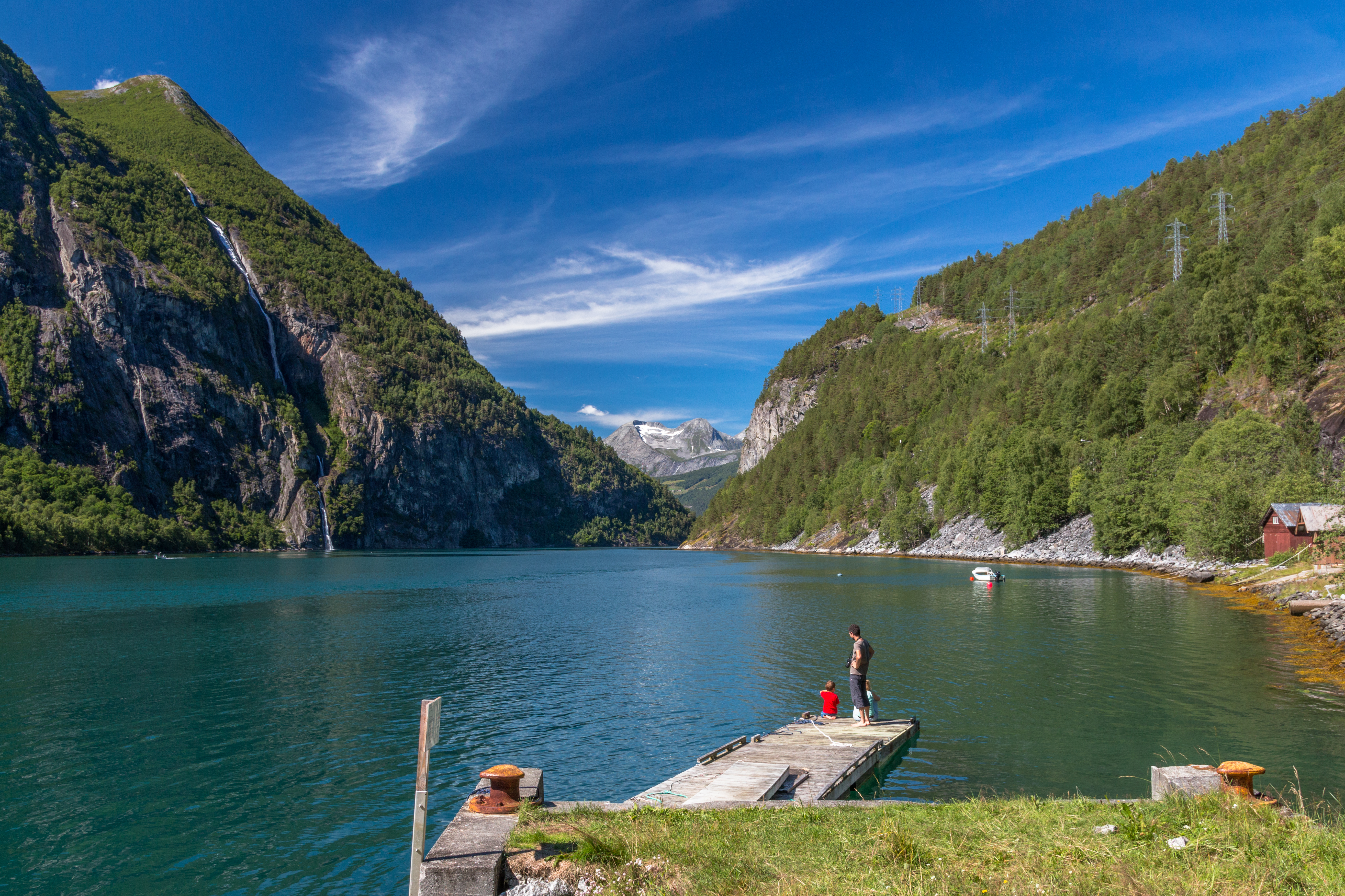 Tafjord idyll